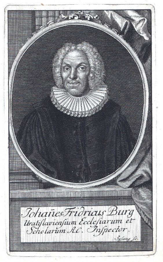 Portrait von Johann Friedrich Burg